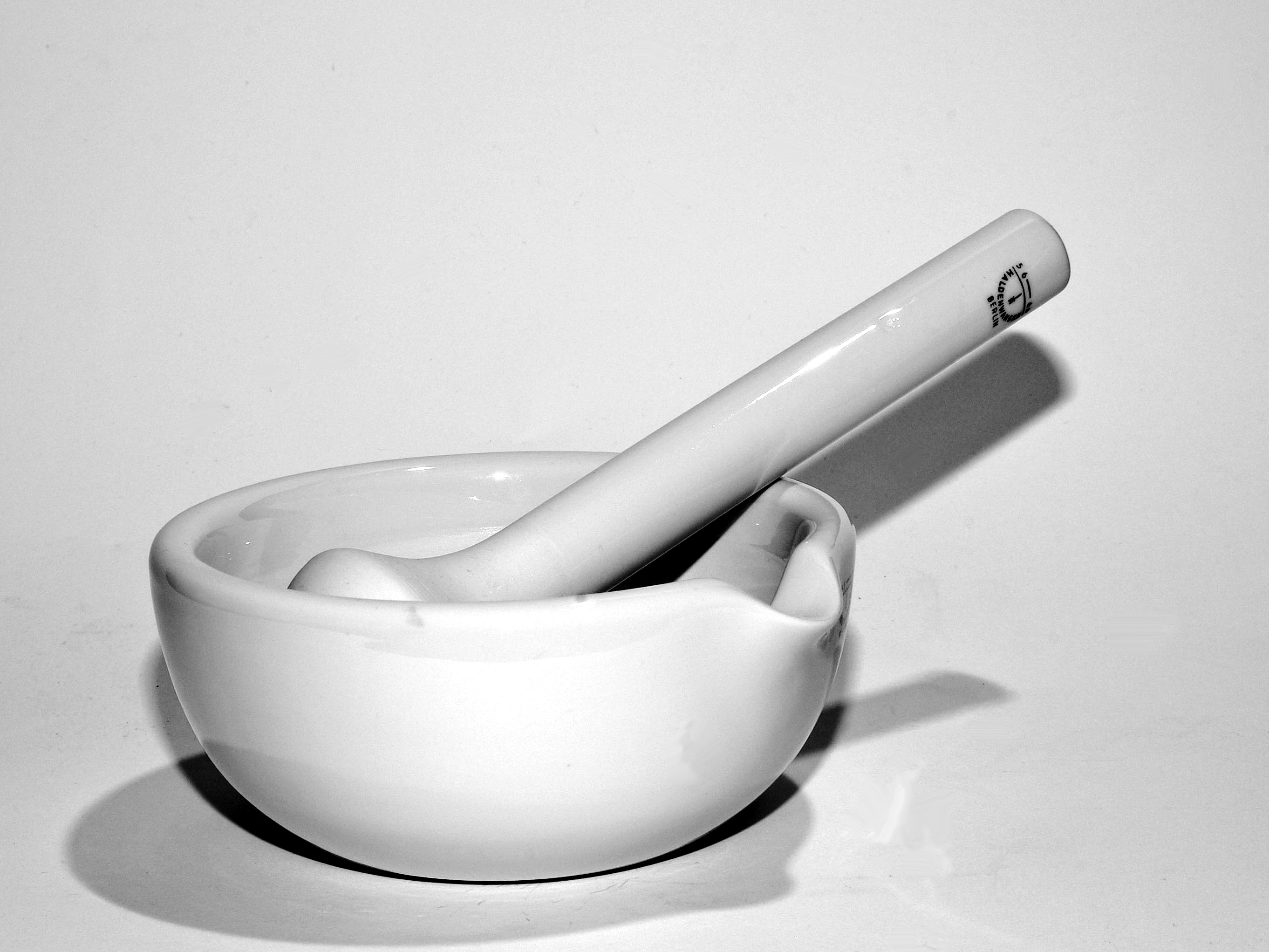 Abbildung eines Porzellanmörsers